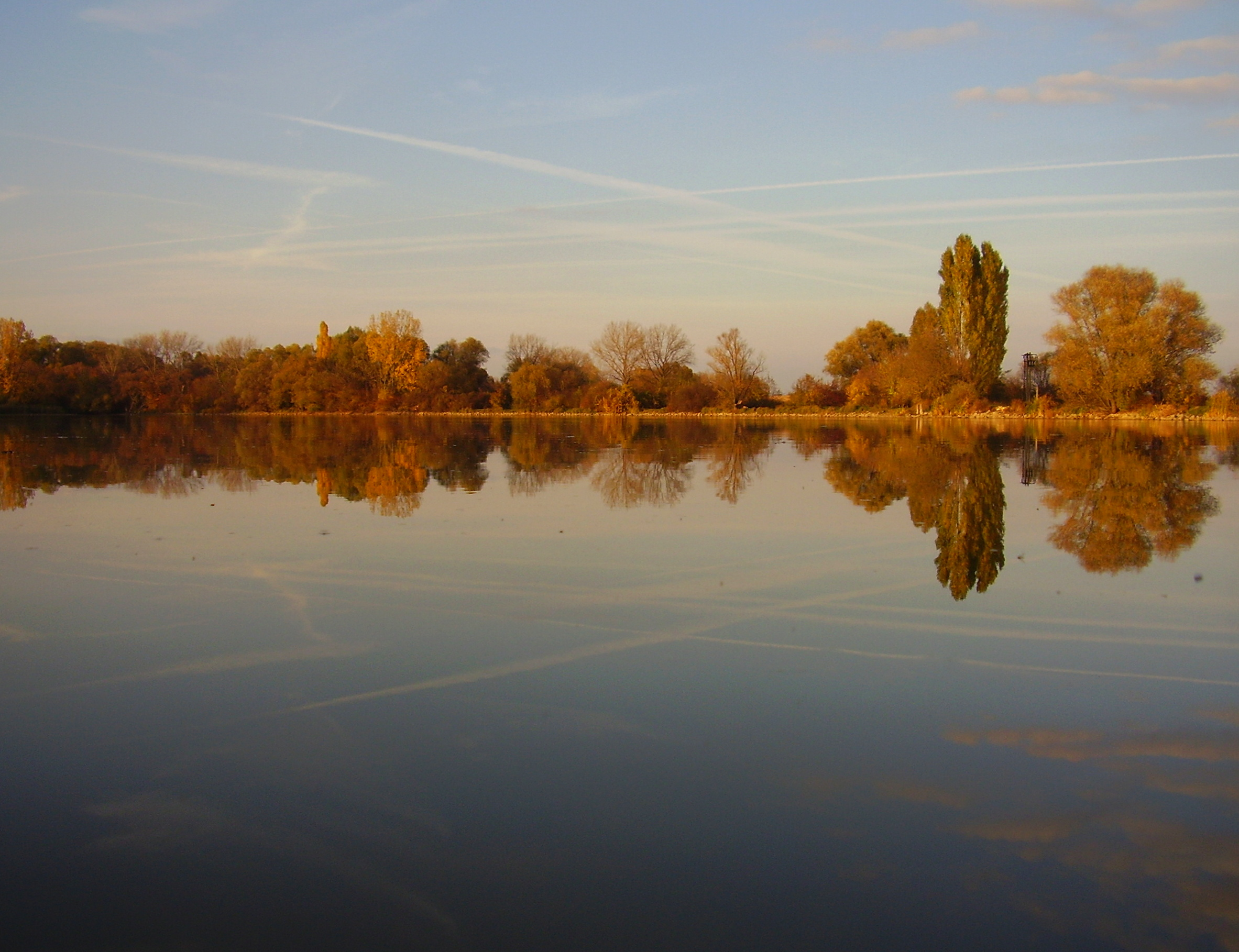 Rybník